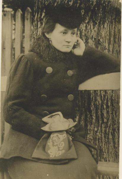 Marija Lastauskienė (1872 m. gegužės 15 d. Šiauliuose – 1957 m. liepos 19 d. Kaune) – Lietuvos visuomenės veikėja, rašytoja. Kartu su seserimi pasirašinėjo slapyvardžiu Lazdynų Pelėda.